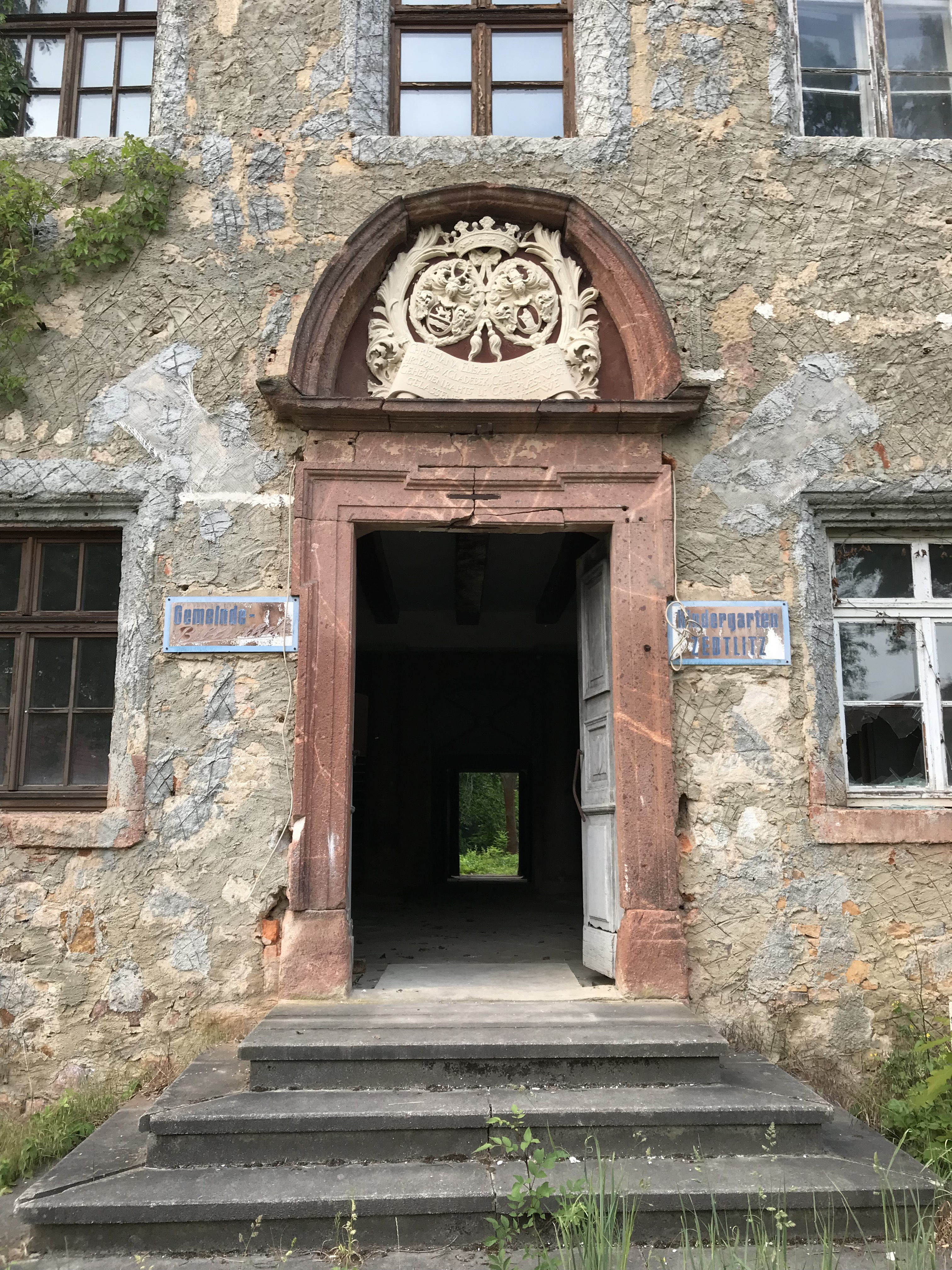 Erschlossen wird das Gebäude durch ein repräsentatives Barockportal in der Mitte. Es hat eine verkröpfte Rahmung mit einem Relief darüber, das über einer Inschrift die Wappen der Familien von Gladecke und von Münchhausen zeigt. Vor ihm ist eine Freitreppe angeordnet.